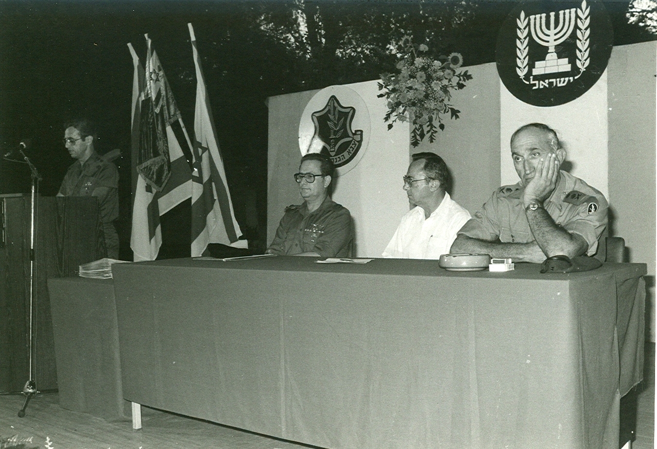 טקס סיום מחזור י' 1983- שר הביטחון משה ארנס, הרמטכ"ל רב אלוף משה לוי, מפקד מב"ל אלוף יעקב (ג'קי) אבן ונציג המסיימים אל"מ אפרים לפיד